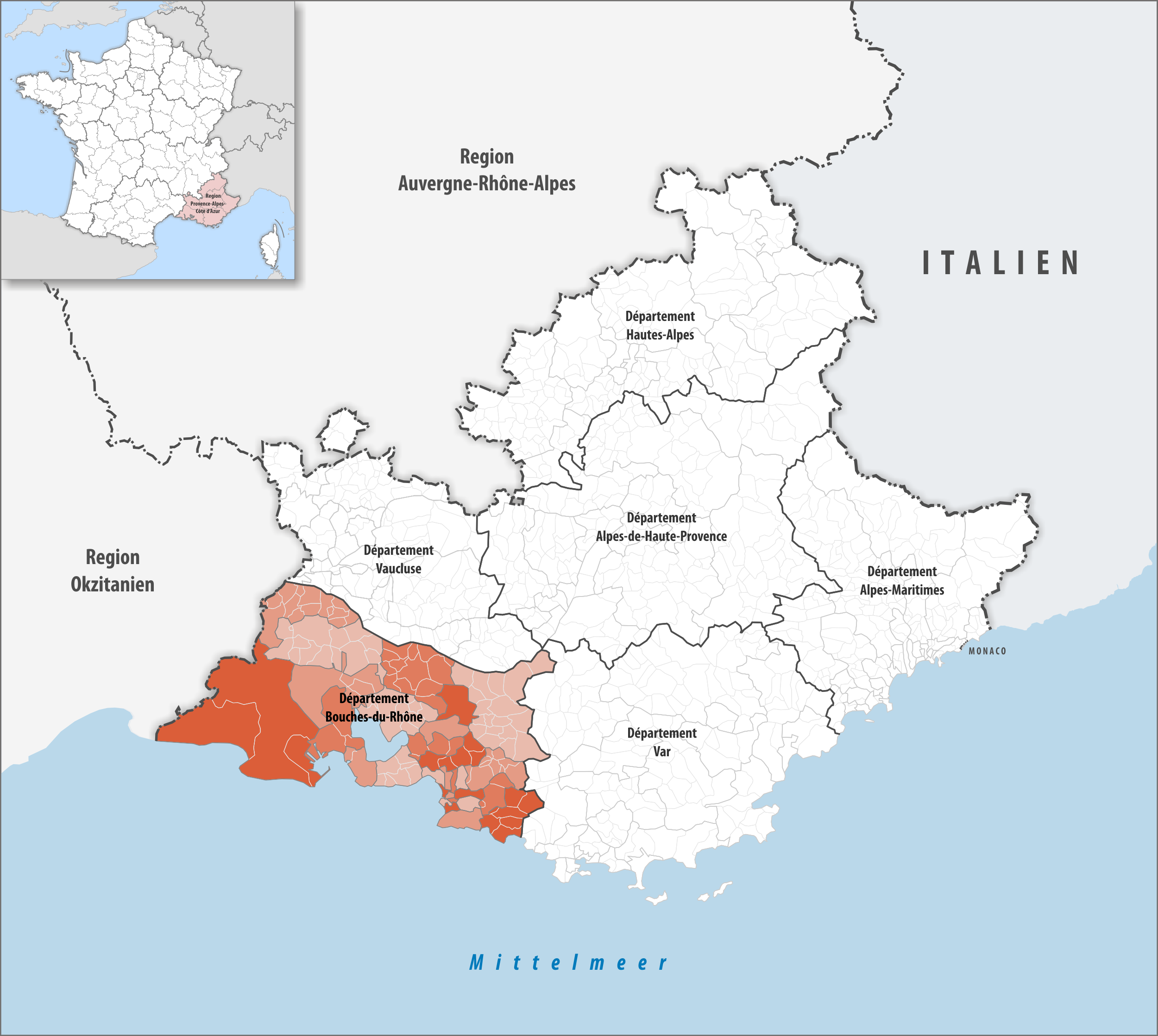 Lage des Departements Bouches-du-Rhône